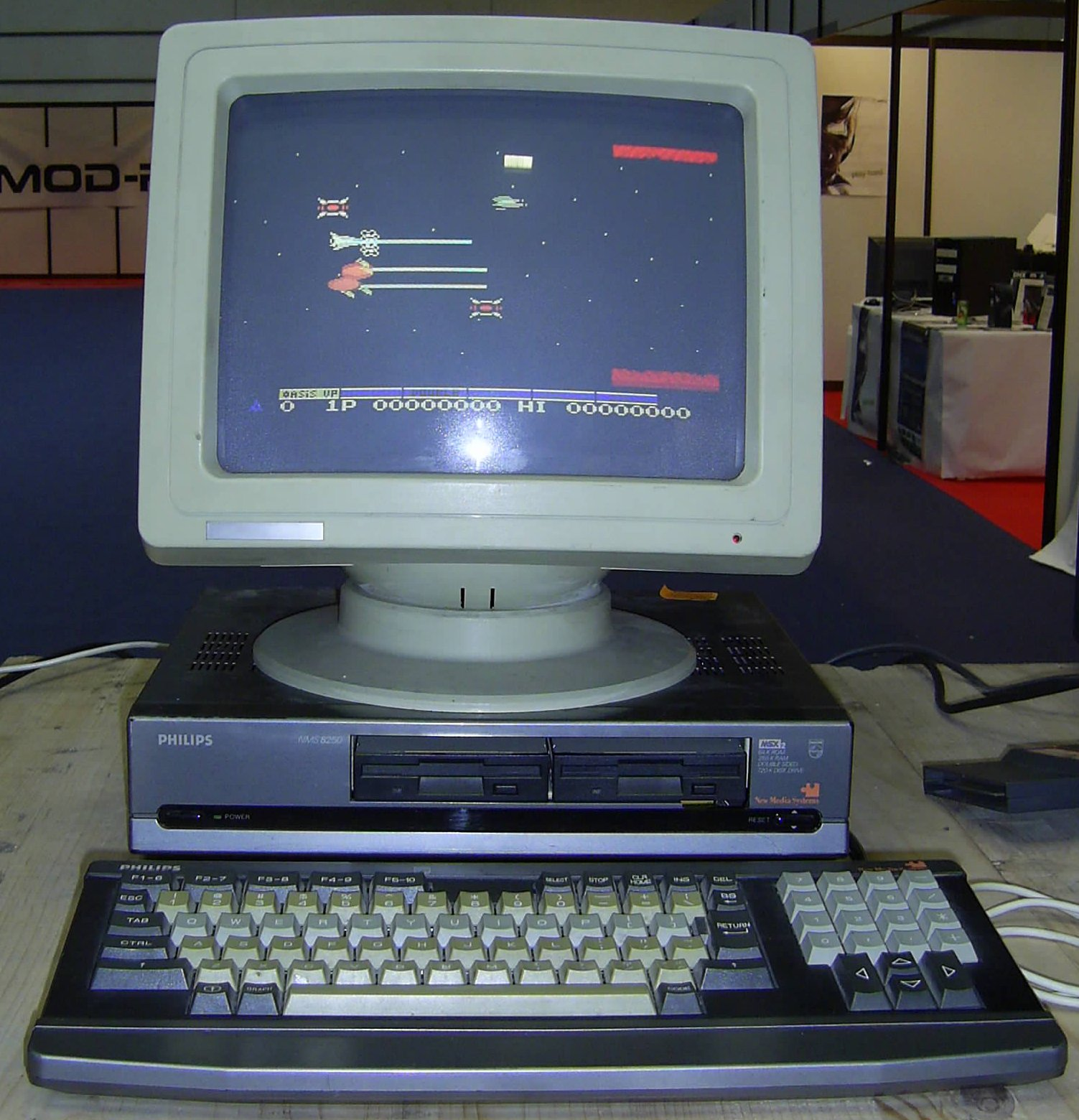 vista frontal de un ordenador doméstico Philips NMS 8250 MSX-2 en el juegódromo de la RetroEuskal 2007